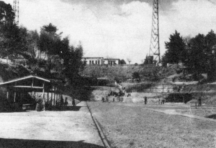 昭和15年（1940年）に撮影された松江放送局。以降昭和42年（1967年）まで床几山にあった（この解説の出典は写真と同じ）。